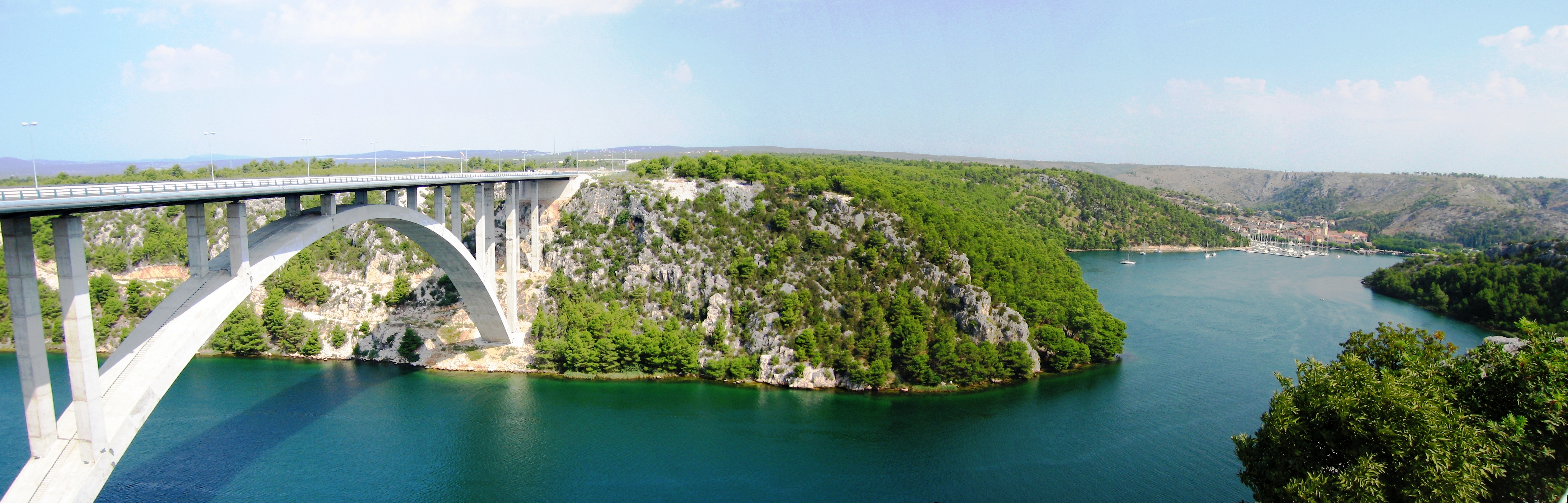 Skradinski most i Skradin